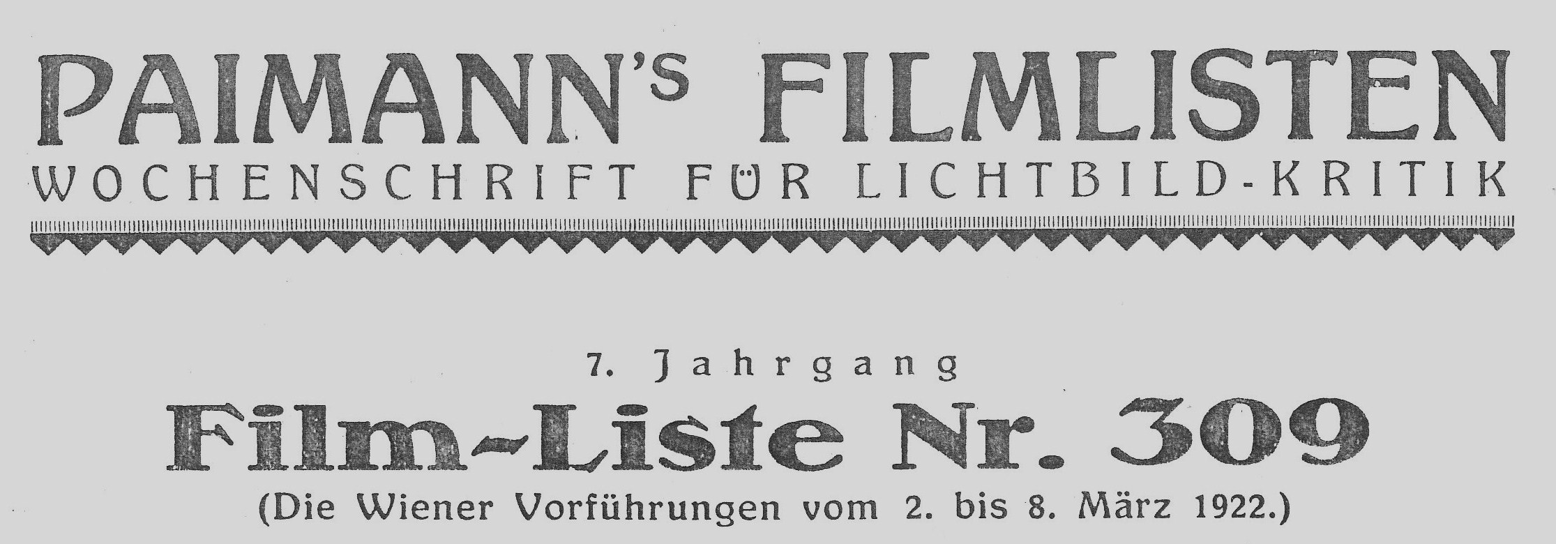 Kopf einer Ausgabe von Paimann's Filmlisten